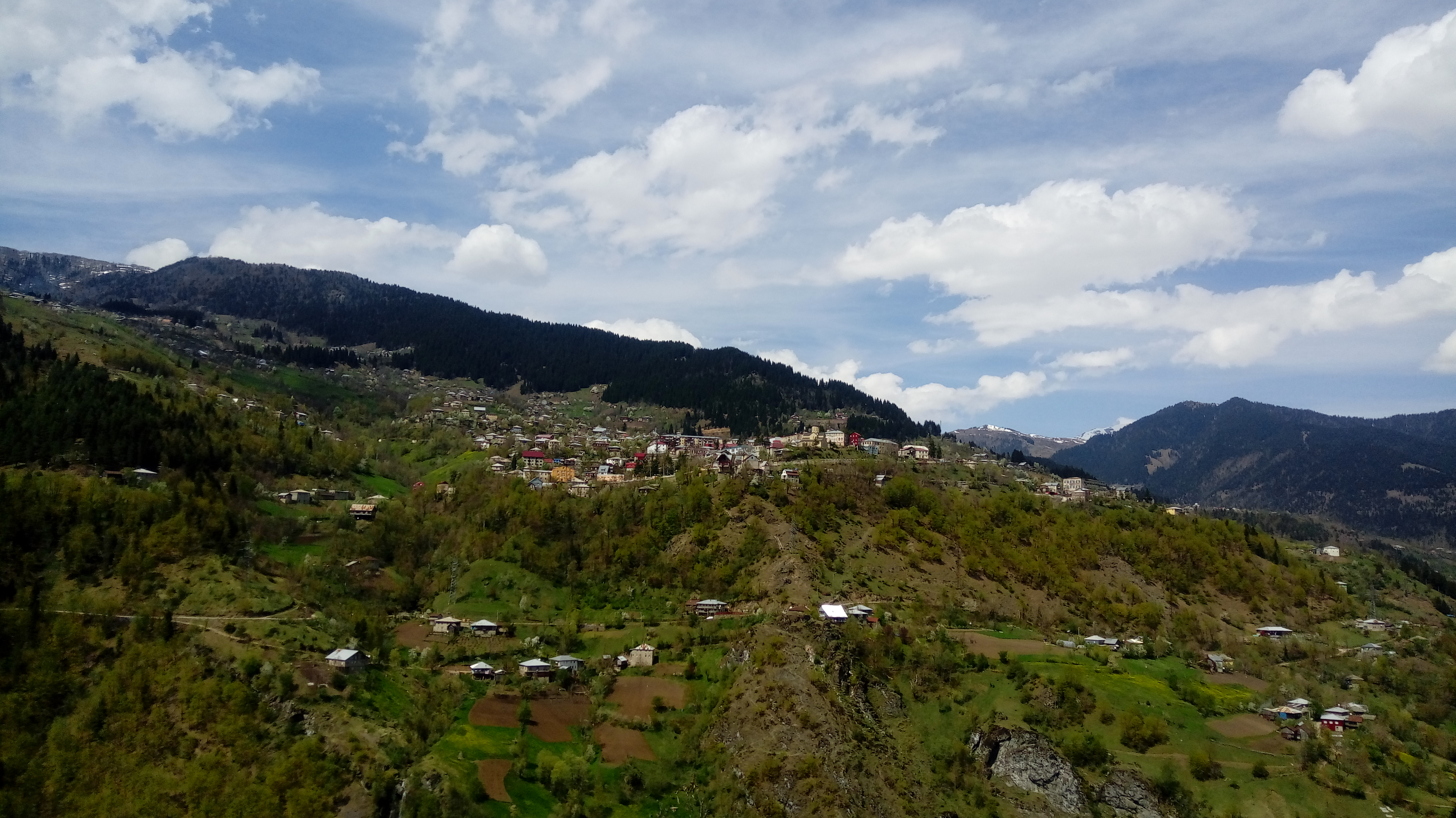 დაბა ხულო